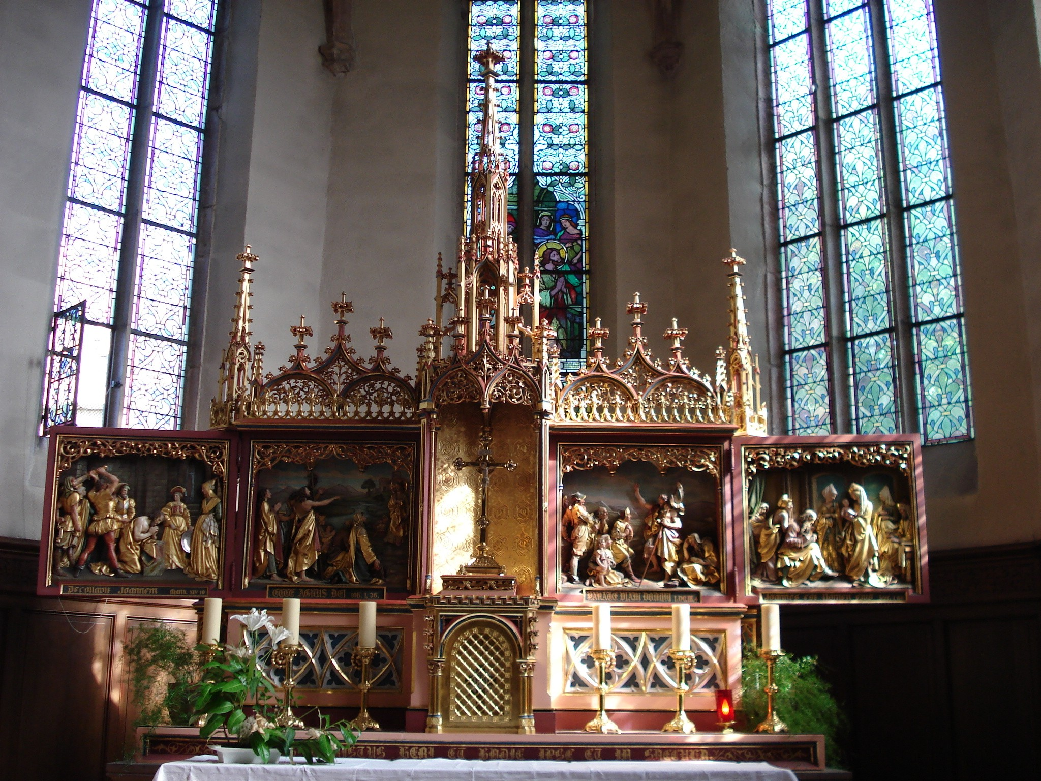 Eglise de Wattwiller, retable en bois polychrome